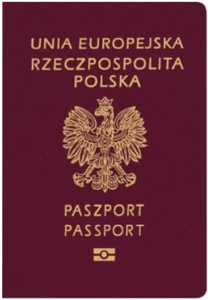 Okładka polskiego paszportu z informacjami biometrycznymi, wzór 2019.